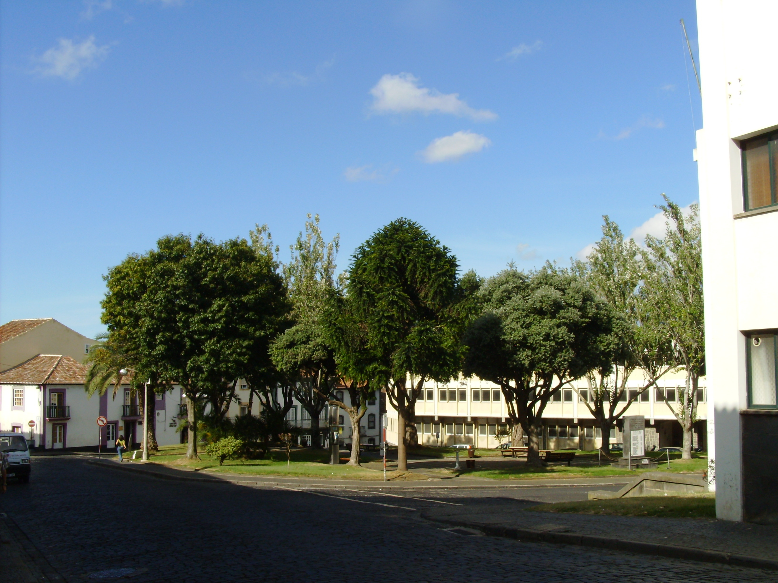 Praça Dr. Sousa Júnior, Angra do Heroísmo, Ilha Terceira, Açores: aqui se ergueu o antigo Convento de São Sebastião.